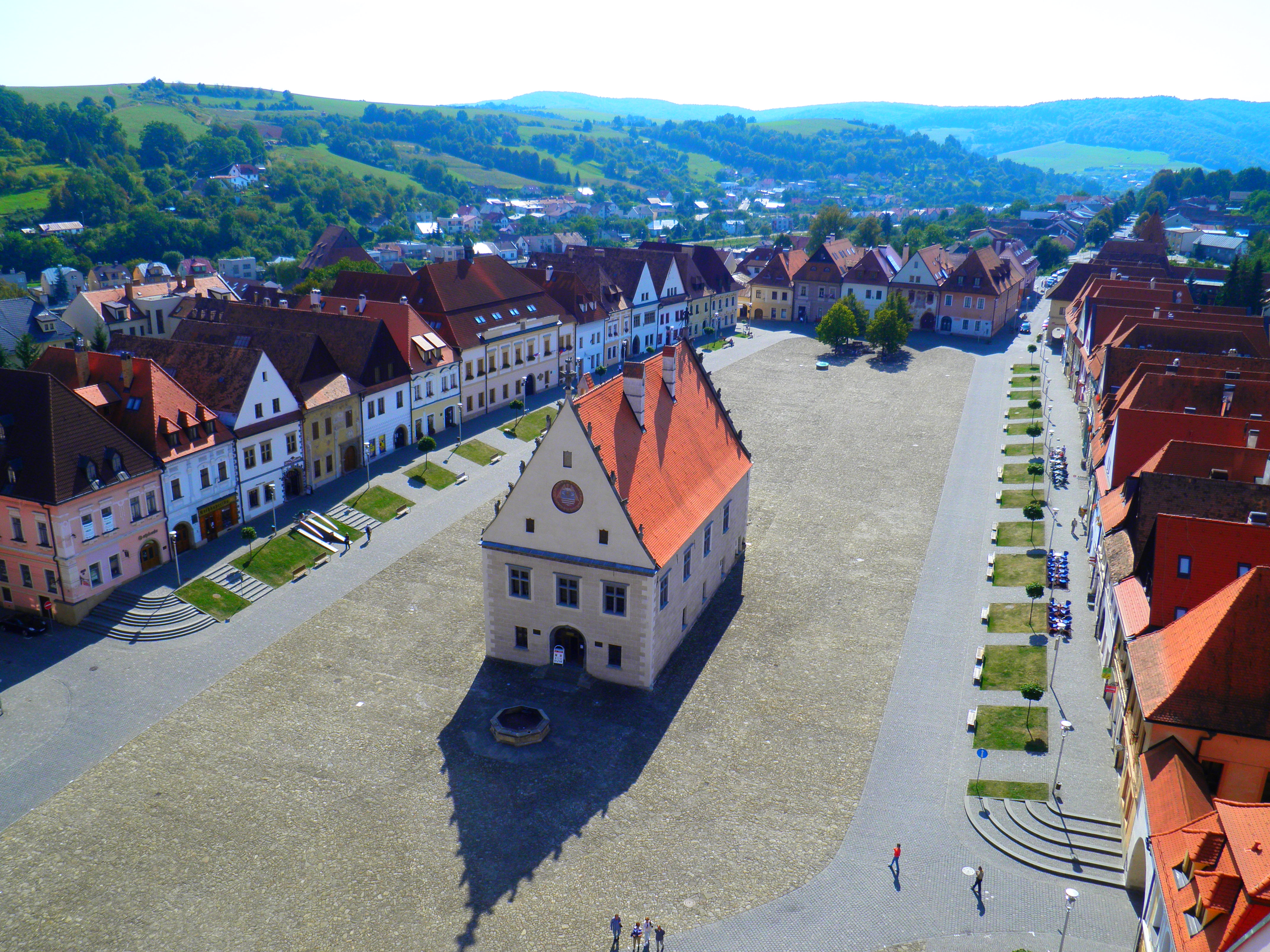 Radnične namestie